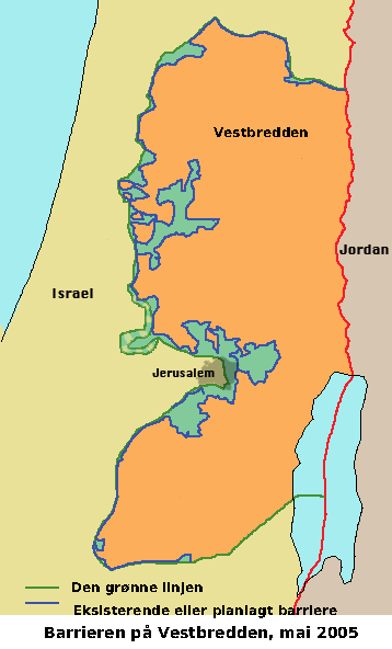 Barrieren på Vestbredden, mai 2005